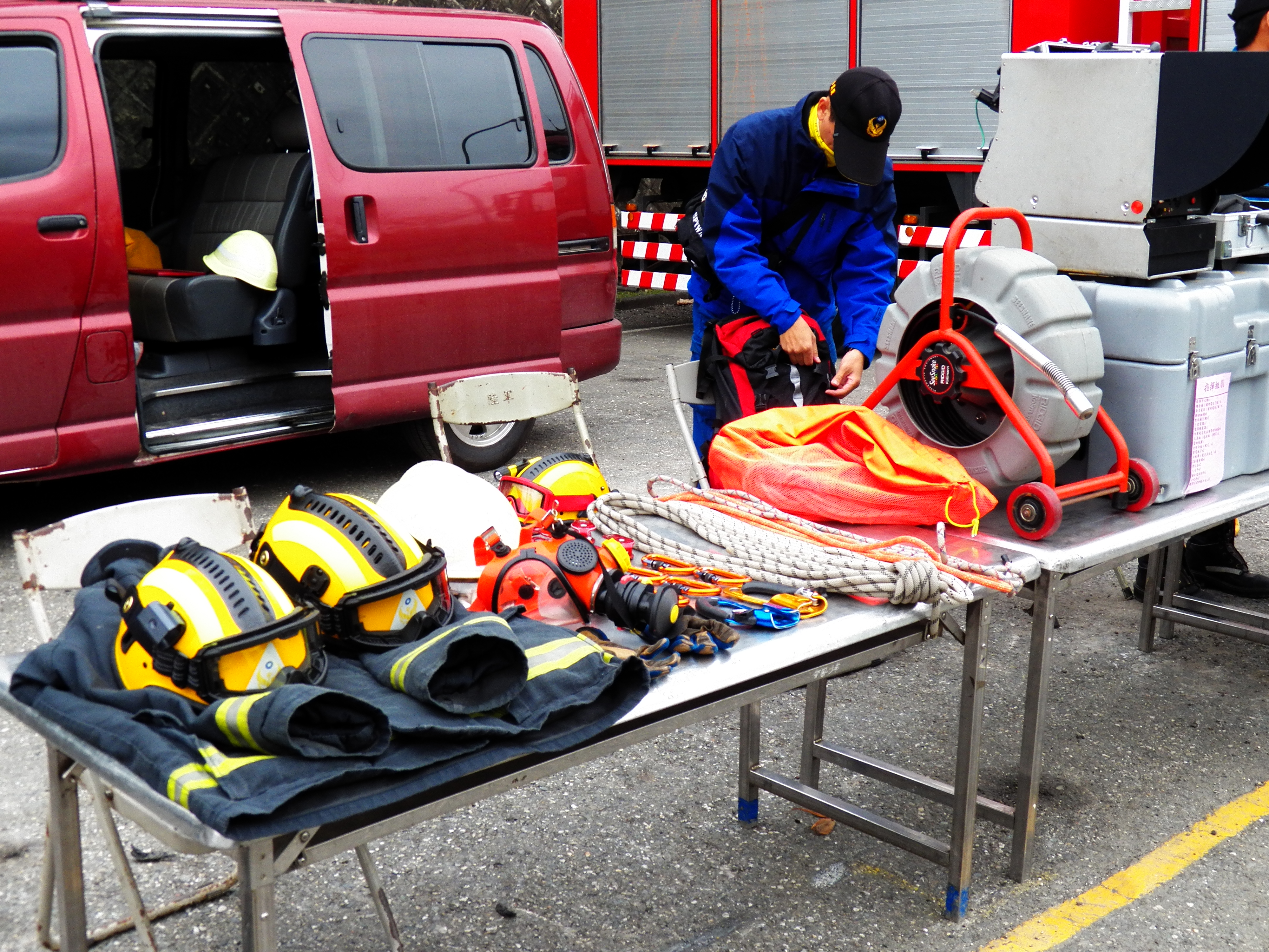 2012年陸軍臺東地區防衛司令部營區開放活動，提供安全支援的臺東縣消防局，除消防車輛外，同時展示消防服、頭盔、防毒面具、繩索等消防救災設備。